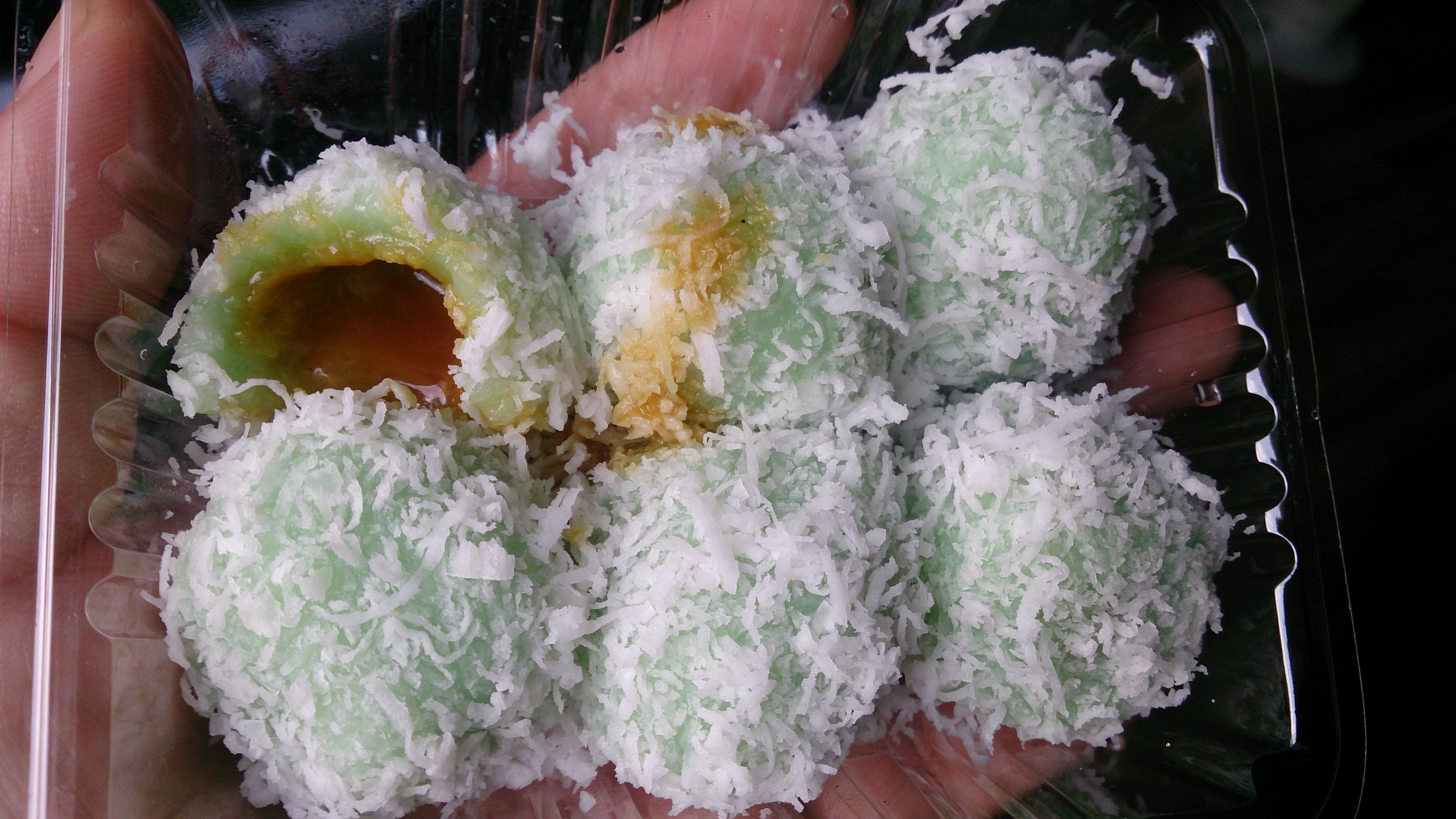 nonya kueh filled with gula melaka (brown sugar)